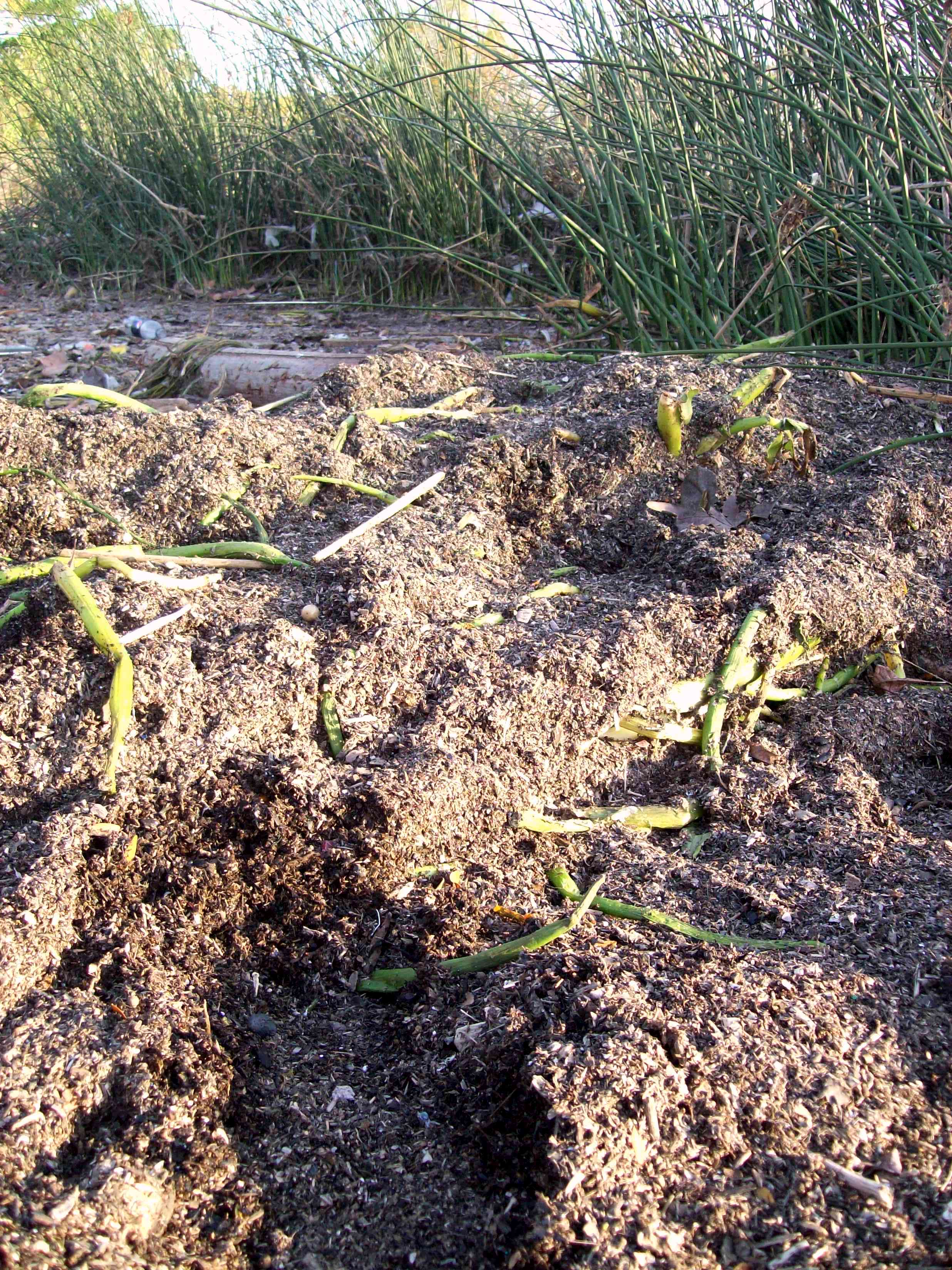 Resaca de río. Este tipo de medio orgánico flotante es depositado en las riberas por las aguas del río Paraná y del Río de la Plata.